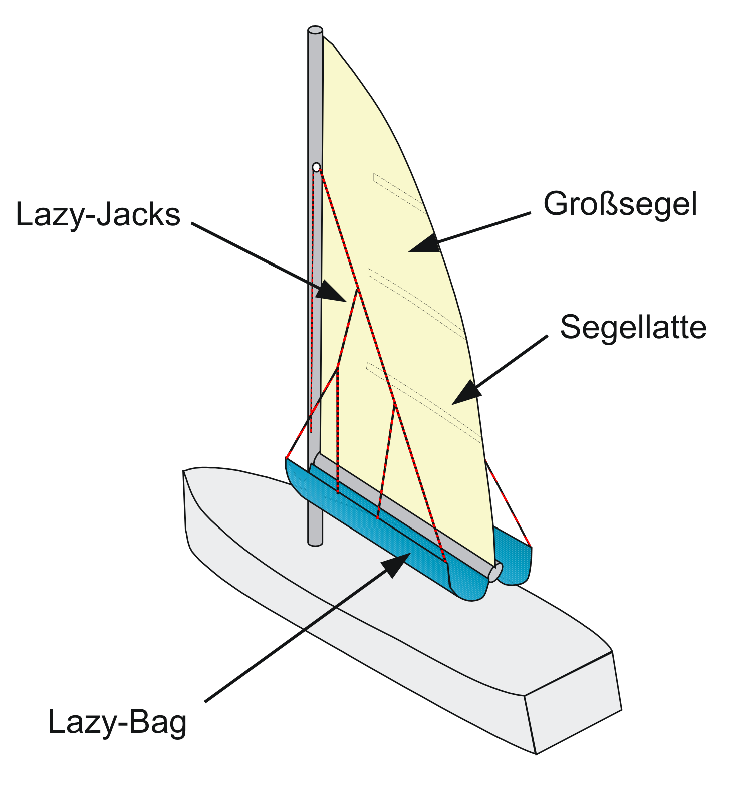 Lazy-Jacks und Lazy-Bag eines Segelschiffs